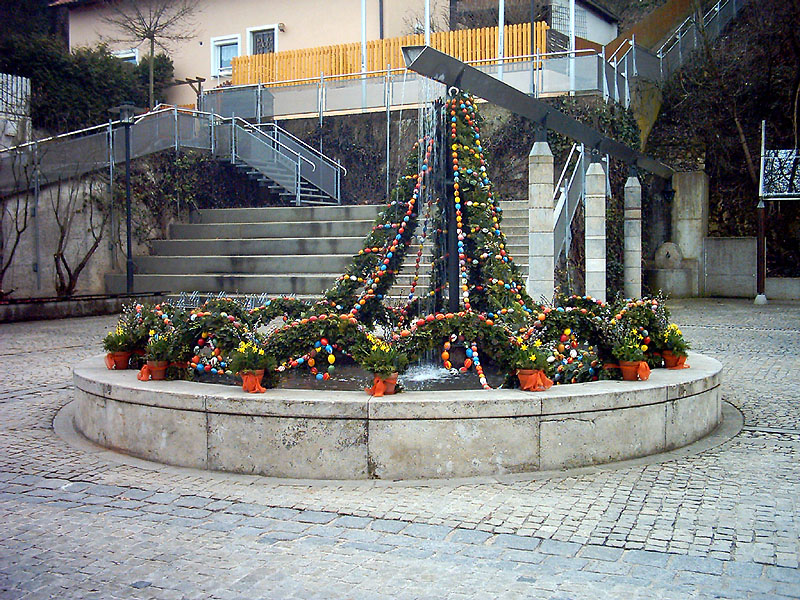 Lappersdorf, Bayern: Österlich geschmückter Brunnen auf dem Marktplatz